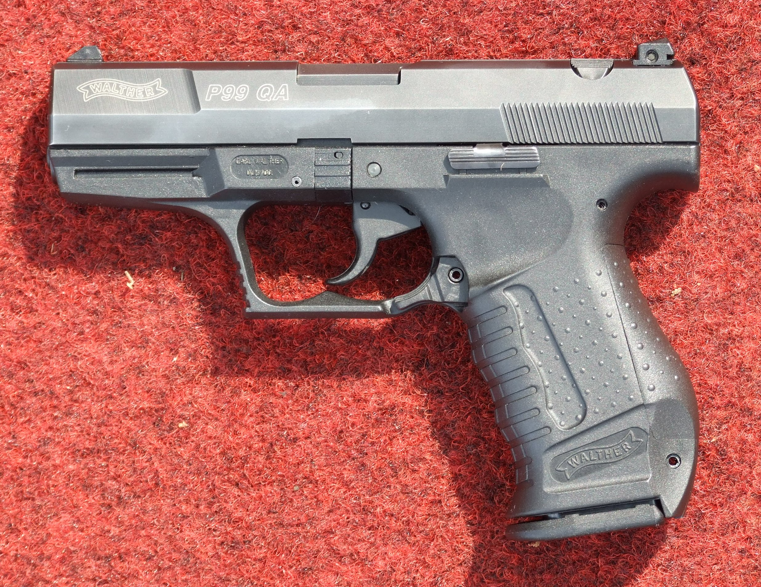 Walther P99 (QA trigger) caliber 9 mm Luger